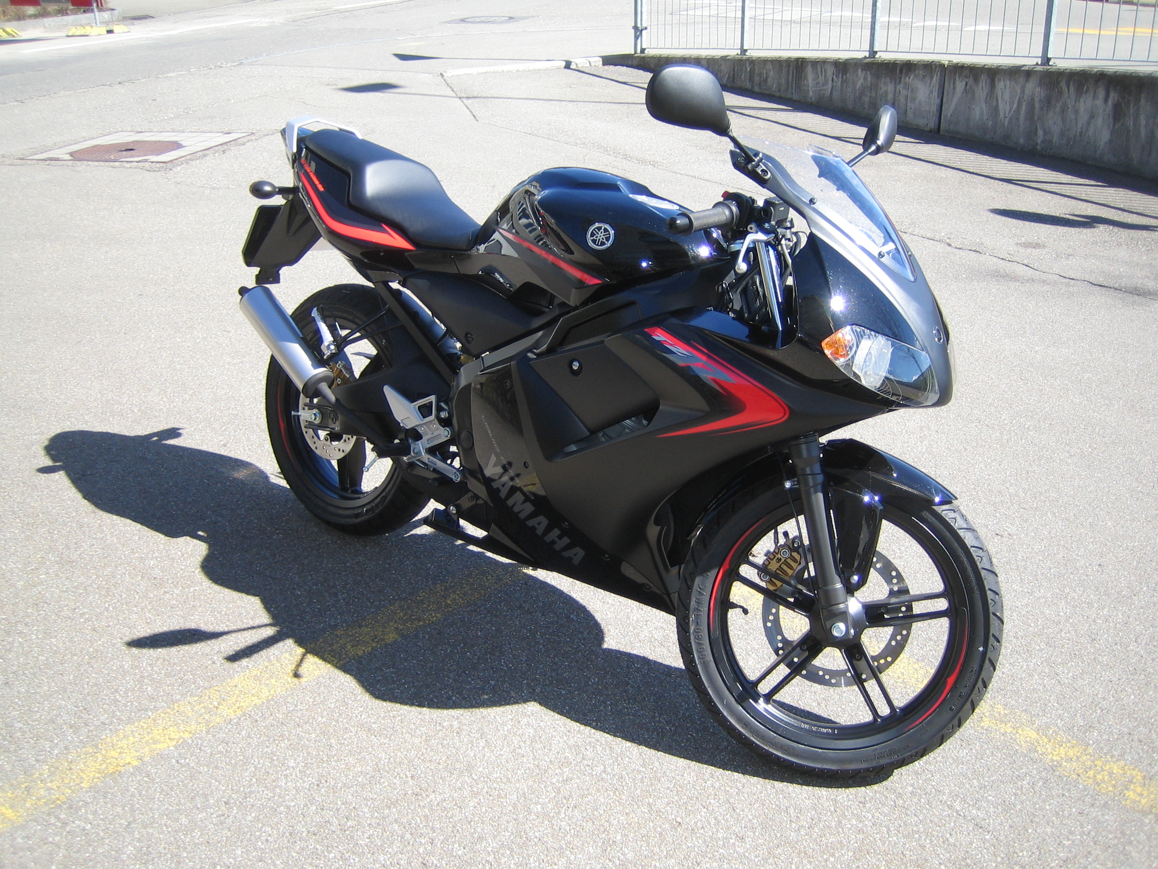 Serienmässige Schweizer Ausführung der Yamaha TZR 50 in Midnight Black (Schwarz), Modelljahr 2006